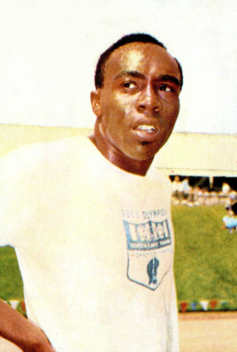 CAMPIONI DELLO SPORT 1969/70 Figurina-Sticker n. 11 - JIM HINES - USA